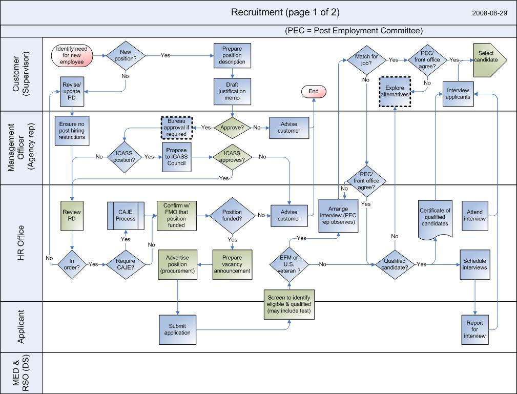 Recruitment